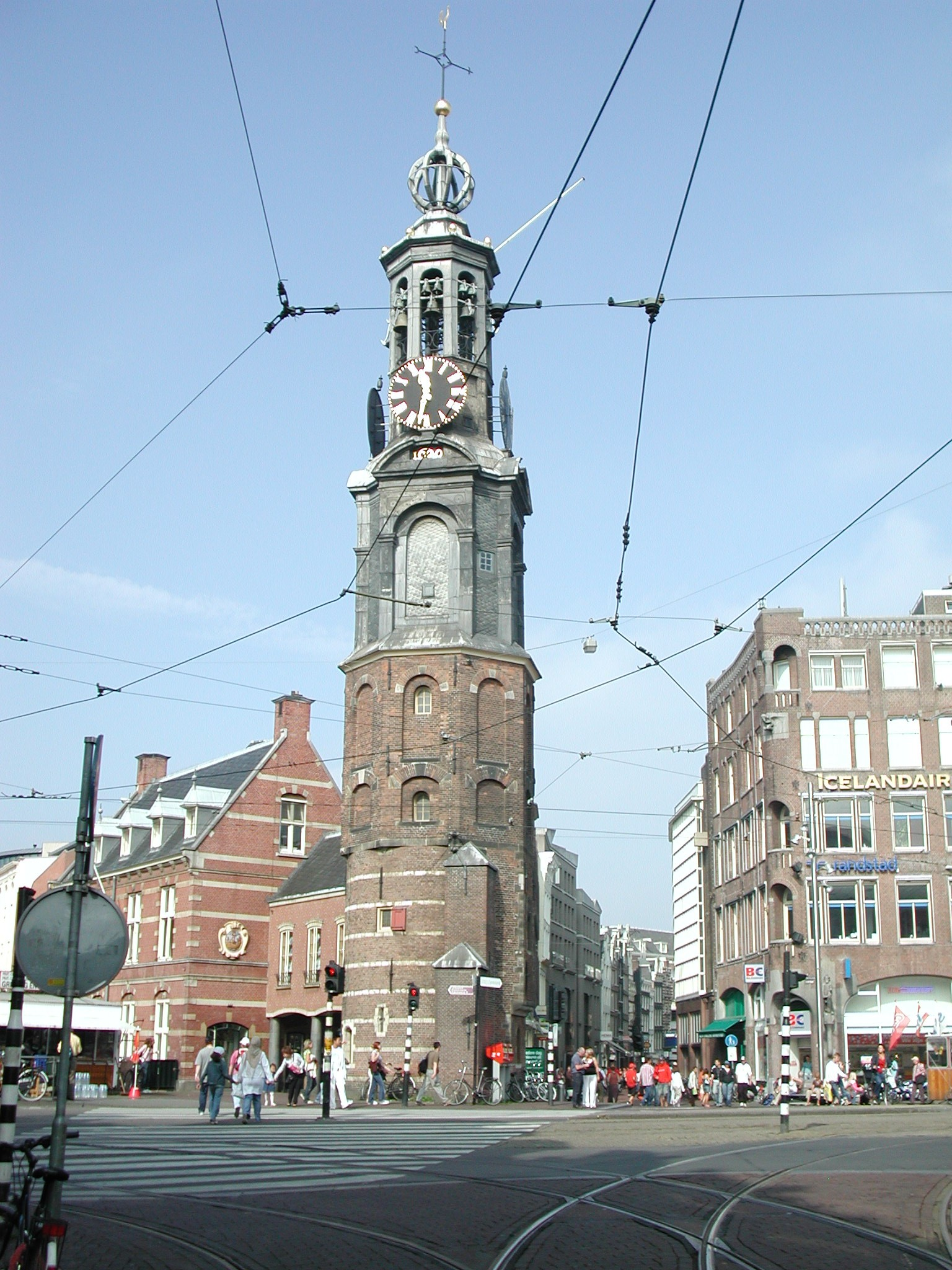 Munttoren, Amsterdam Categorie:Afbeelding Amsterdam